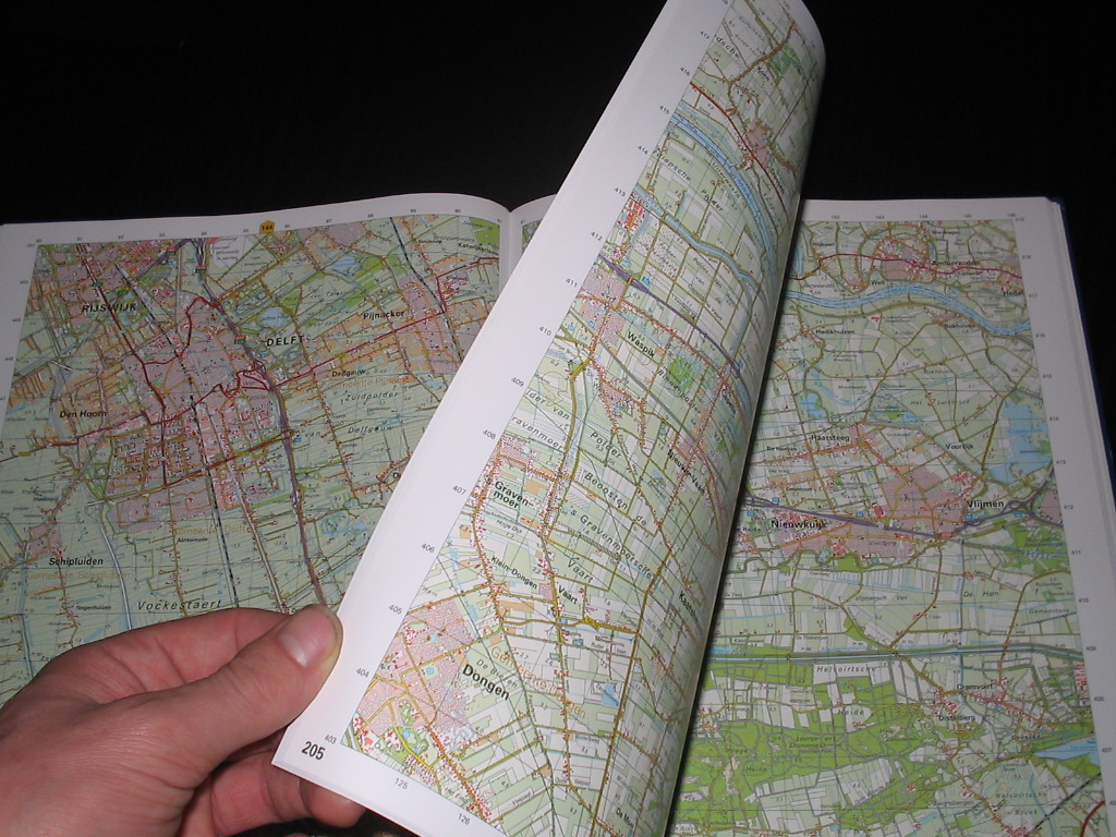 Voorbeeld van een atlas